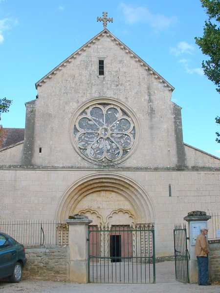 Collégiale Notre-Dame de Montréal (Yonne)